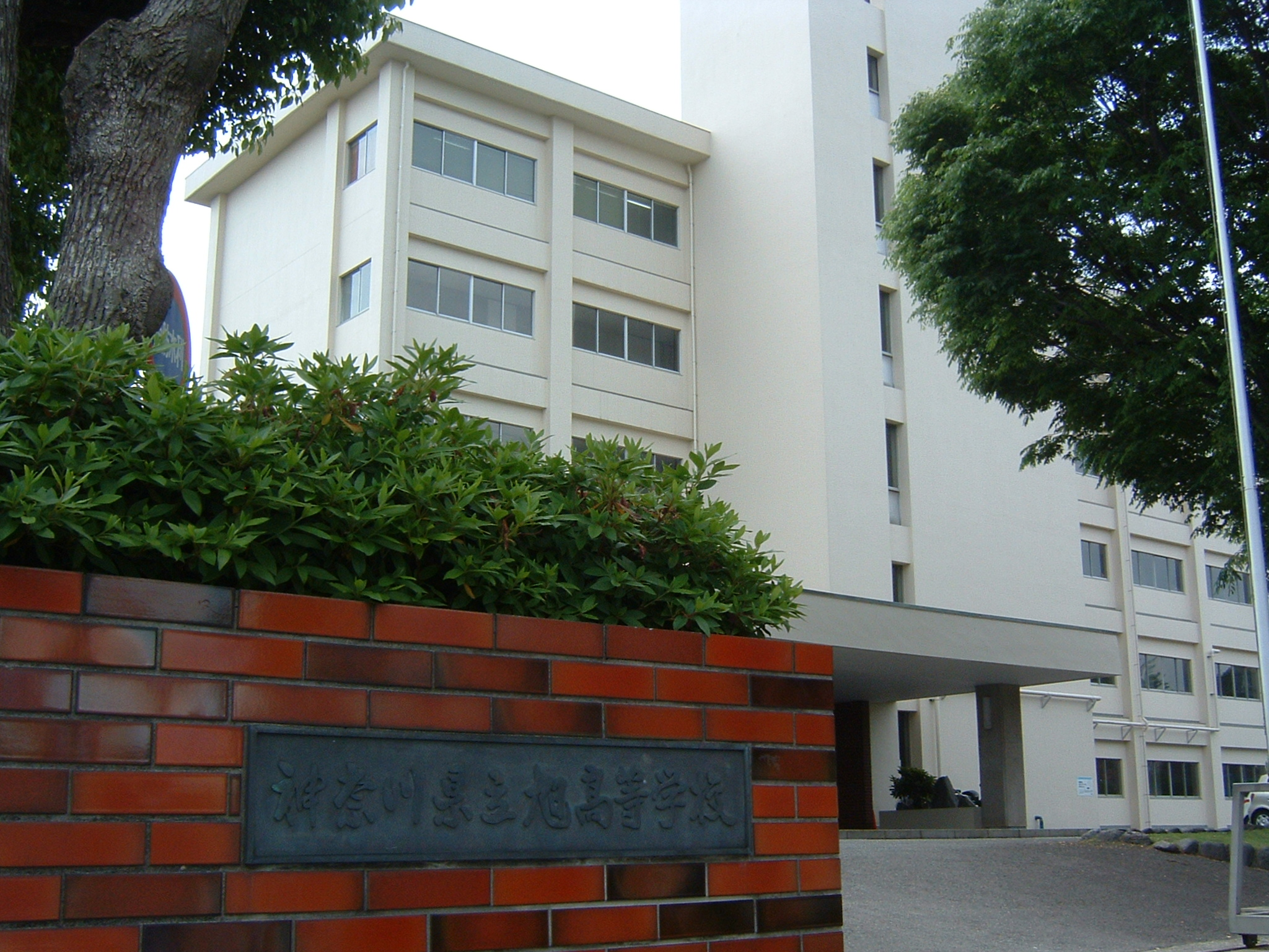 正門前にて撮影